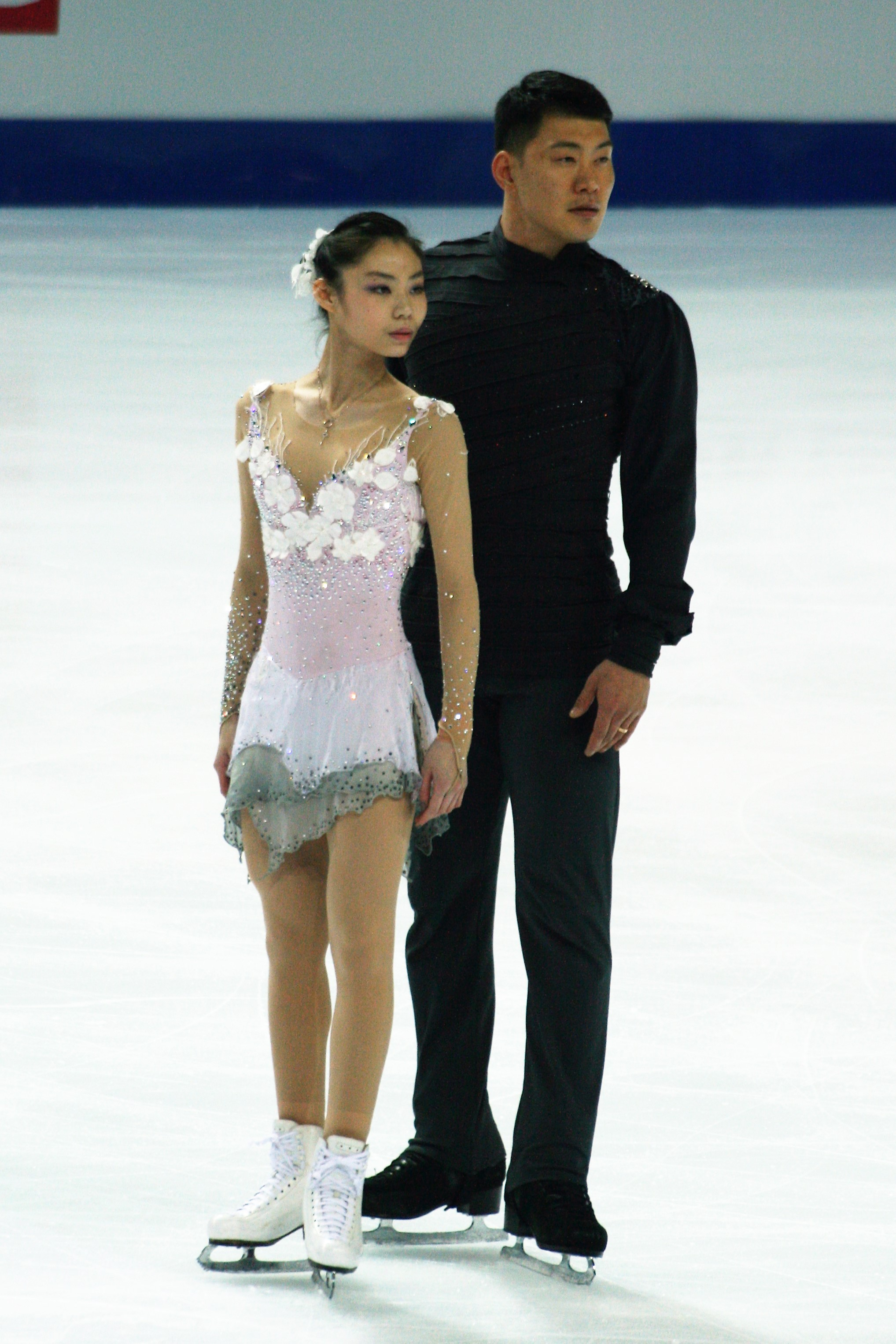 Юй Сяоюй / Чжан Хао (КНР) на финале Гран-при по фигурному катанию 2016-2017